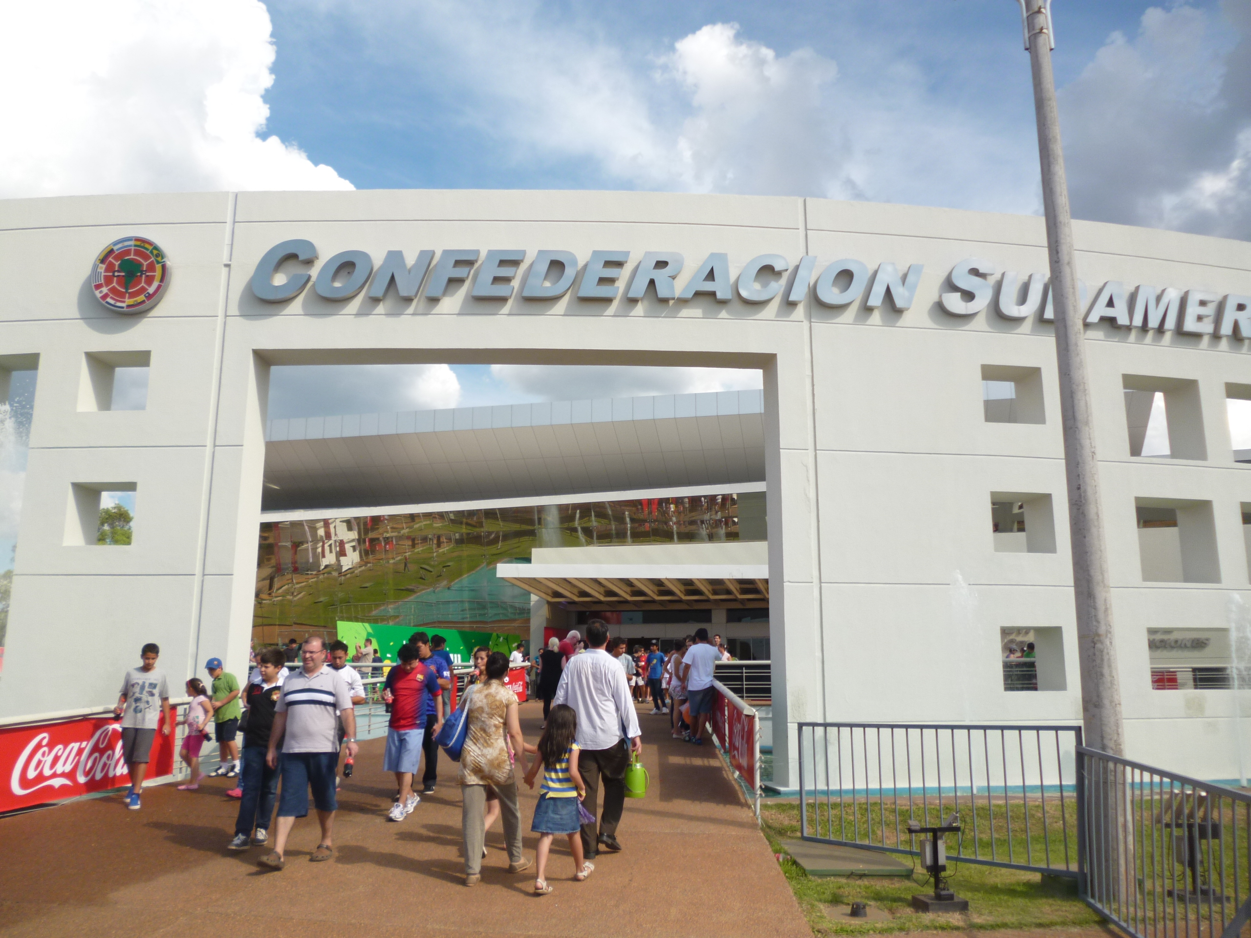 Vista exterior de la entrada al Centro de Convenciones de la Confederación Sudamericana de Fútbol, situado en Luque, Paraguay.